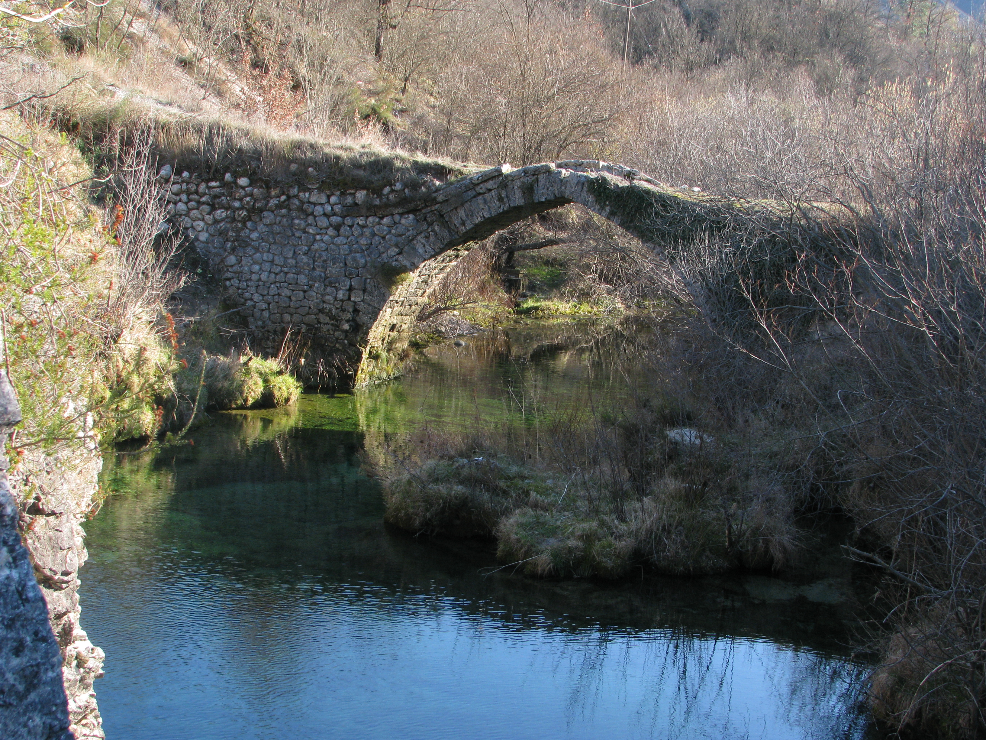 Kod; NKD613, Most na rijeci Sušici u selu Vučja, 15-ak km od Trebinja.